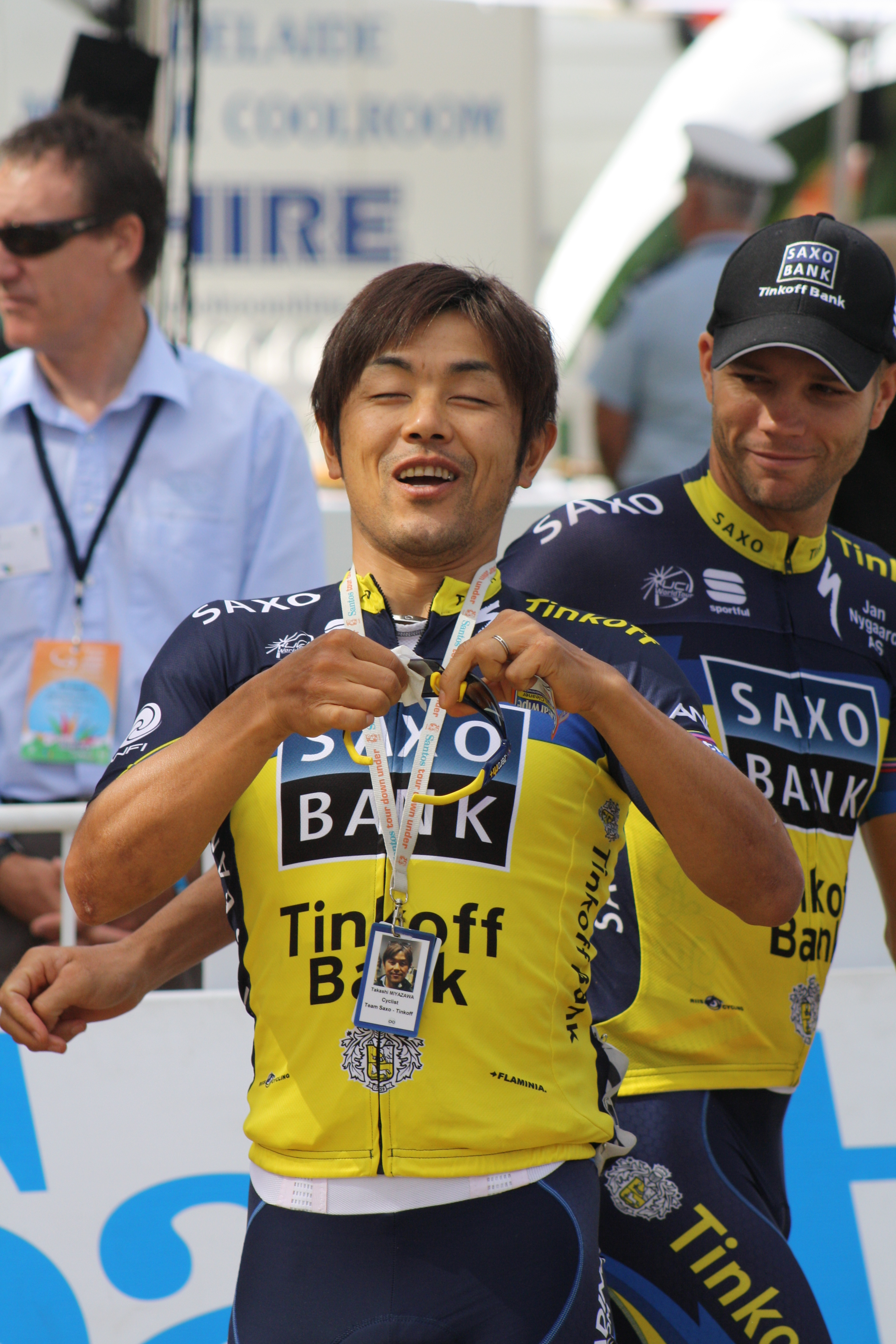 Miyazawa